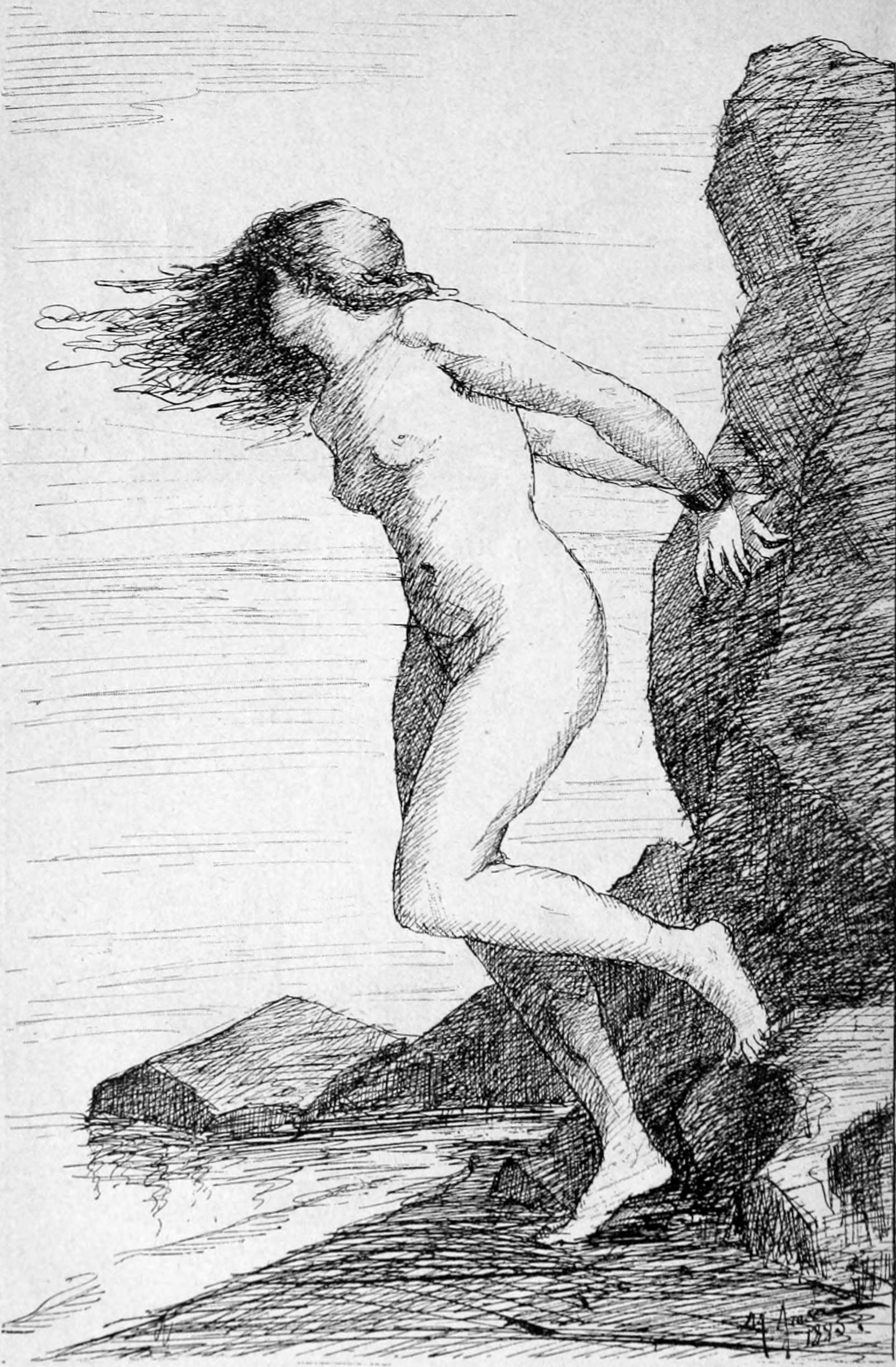 Andromède